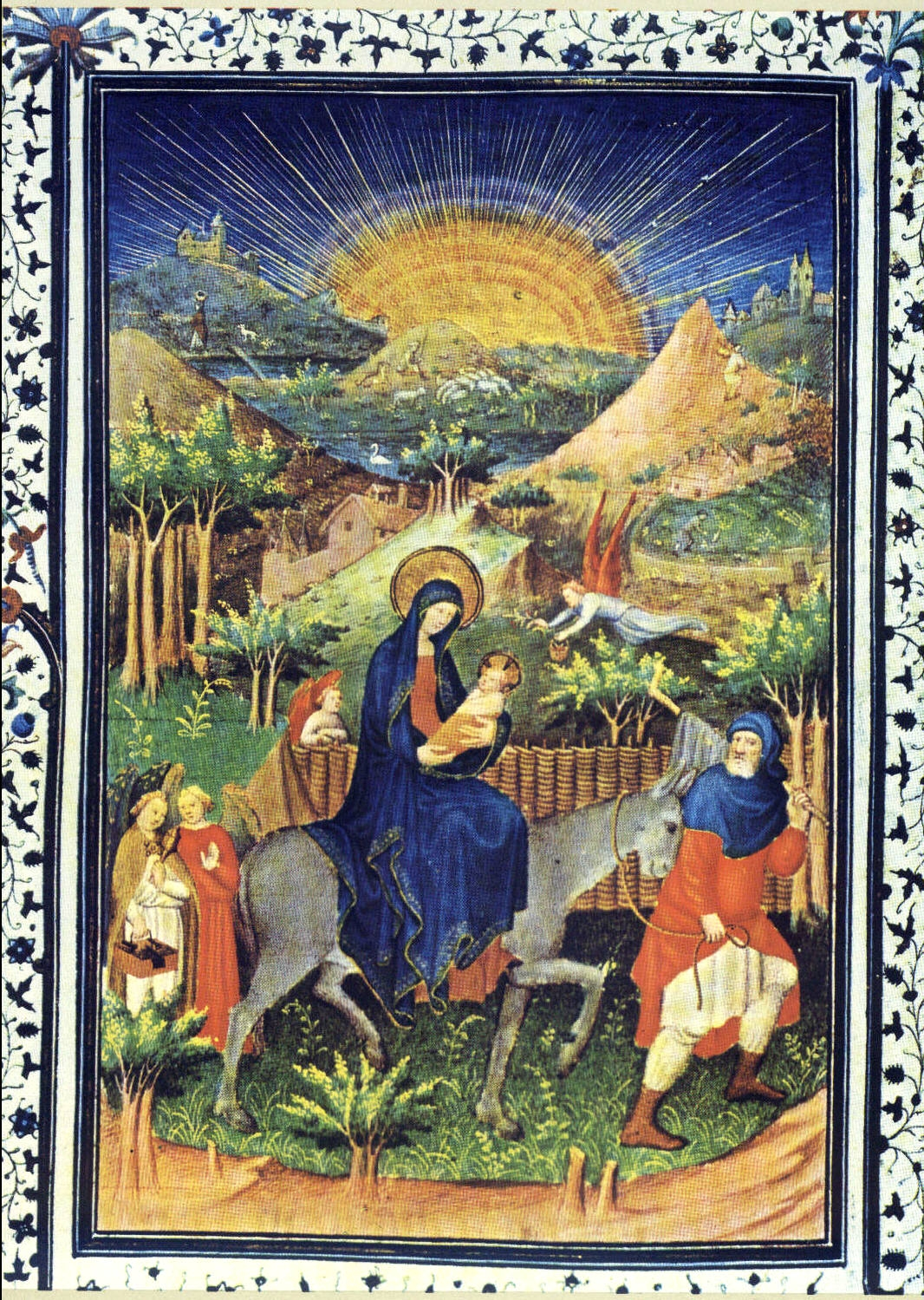 Miniatur Flucht nach Ägypten